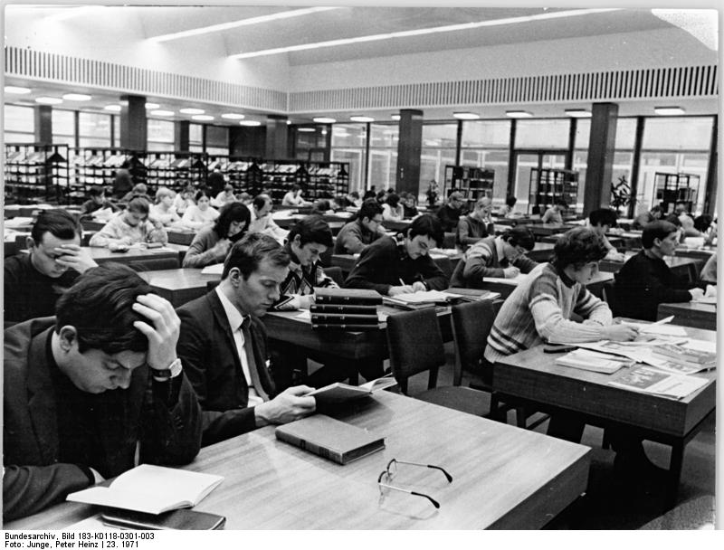 Berlin, Stadtbibliothek, Lesesaal Zentralbild Deutsche Demokratische Republik 23.3.71-rü Die Berliner Stadtbibliothek - Hochbetrieb im Lesesaal Copzright - ADN- Zentralbild Reporter: Junde Beachten Sie bitte auch den Begleittext und die Fotos K 0118-301-1+2N unf 4+5N